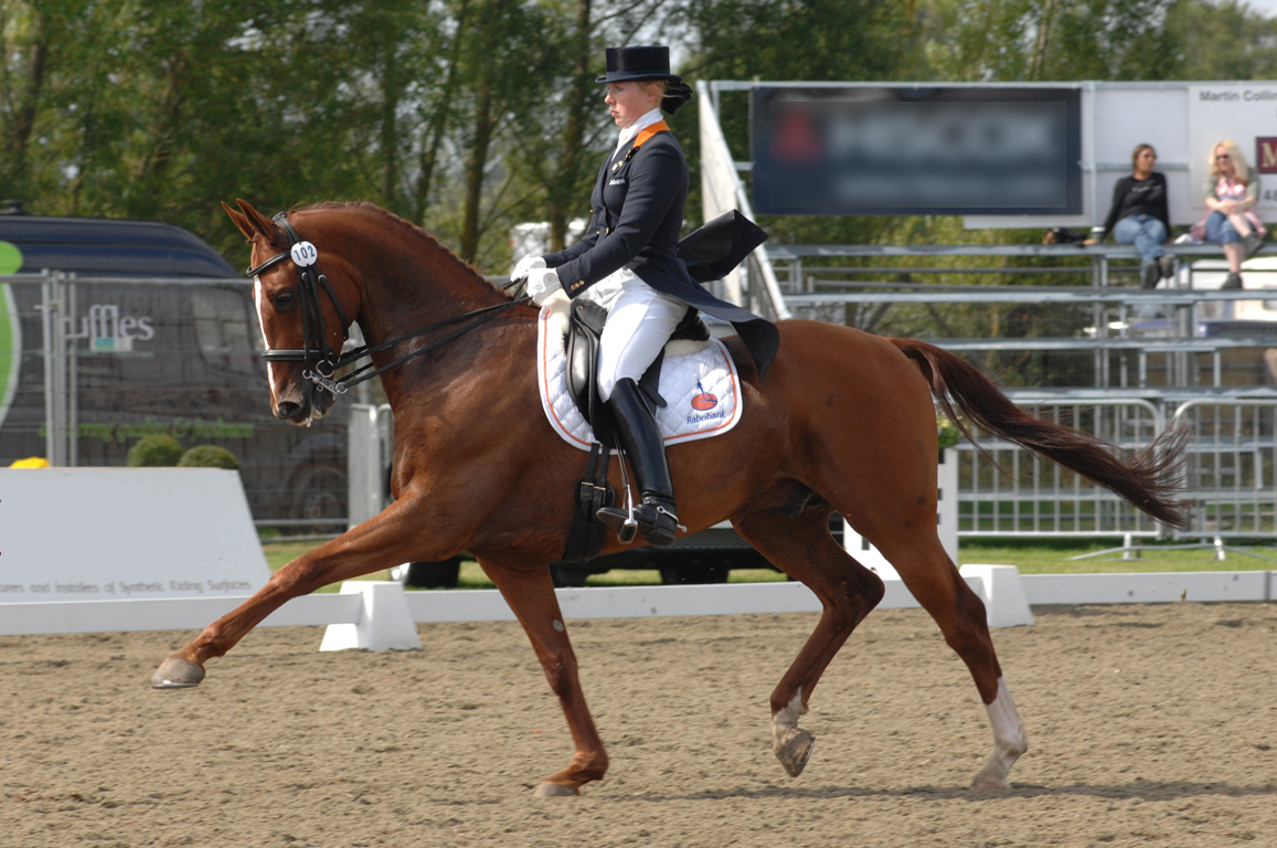 Uitgestrekte draf tijdens een wedstrijd door Jenny Schreven; KWPN (Koninklijk Warmbloed Paard Nederland)